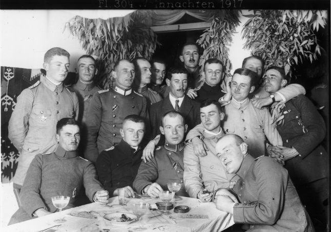 אנשי הטייסת הבאוורית חוגגים בחצר מרחביה את חג המולד. במרכז עומד משולם גפנר חבר הקואופרציה. דצמבר ; 1918 - / קואופרציה